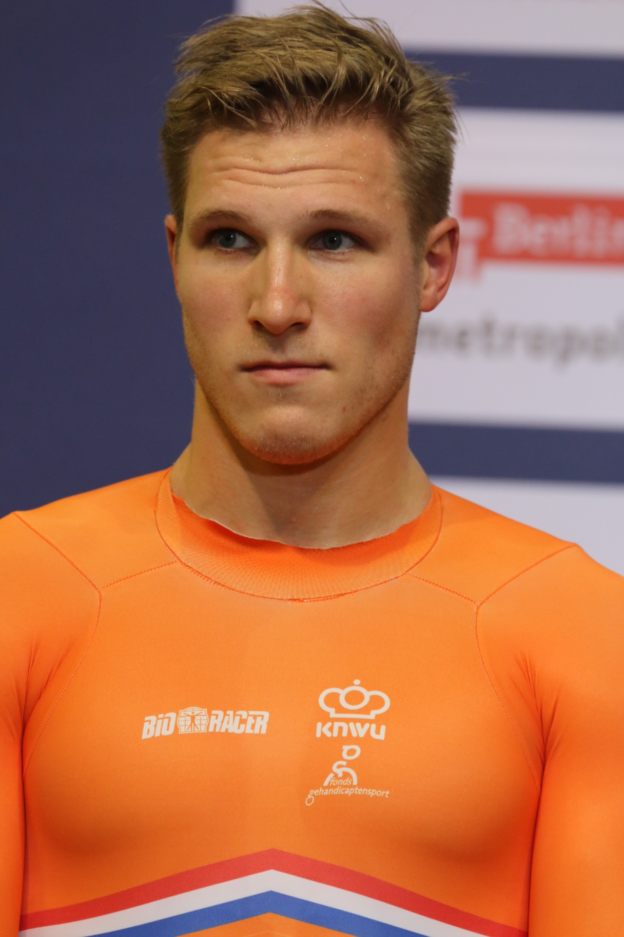 Jeffrey Hoogland, niederländischer Radrennfahrer